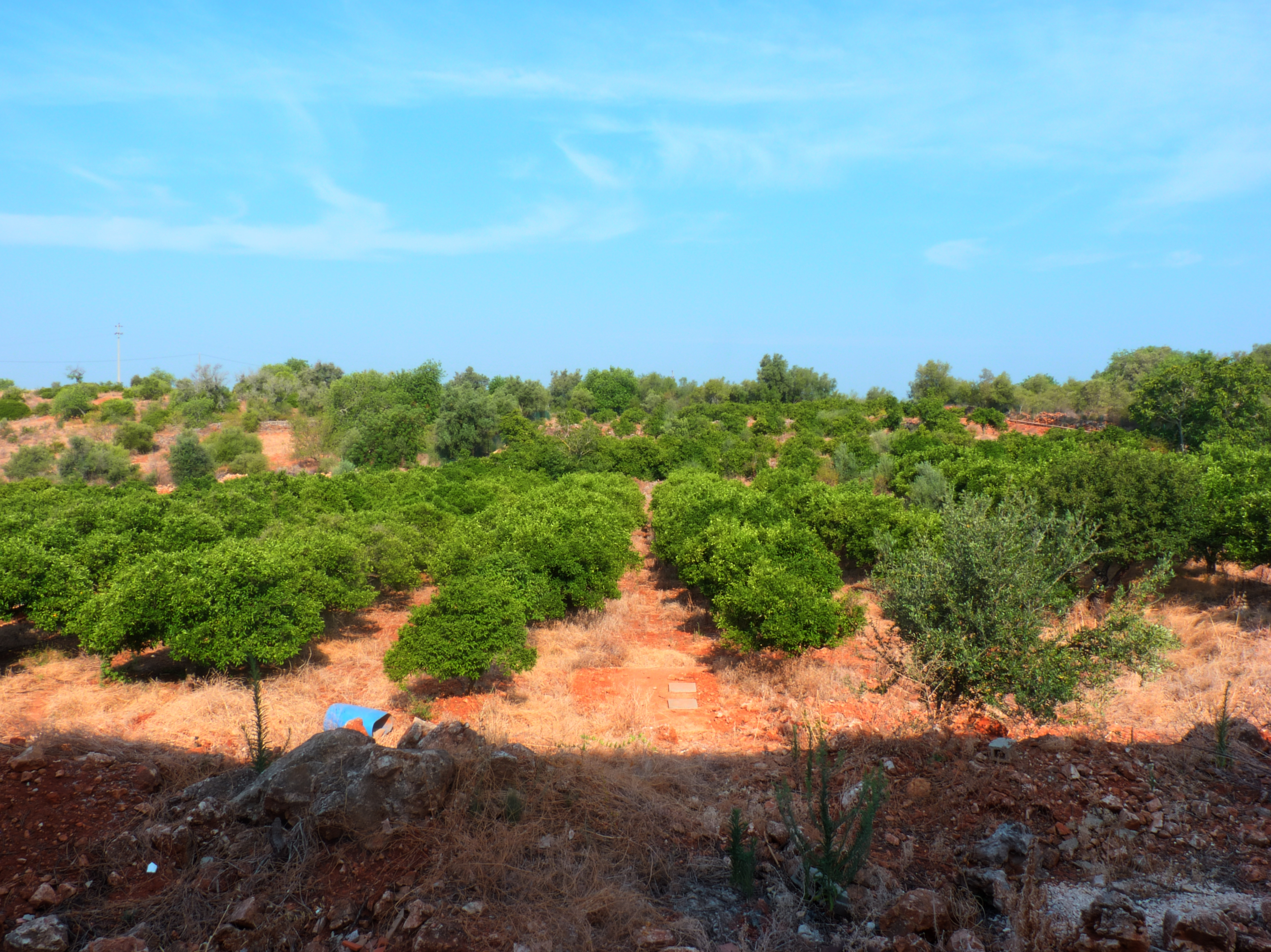 Uma fotografia de grande alcance dinâmico de laranjeiras em Poço Barreto no Algarve.